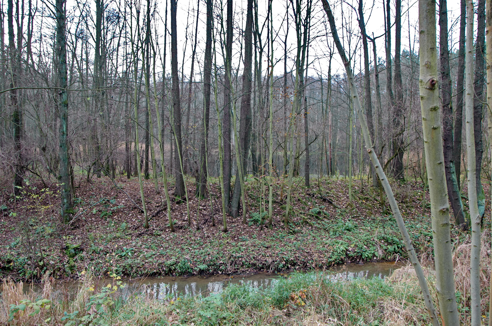 Evropsky významná lokalita Matyáš, v popředí Lomnický potok, Lomnice, okres Sokolov